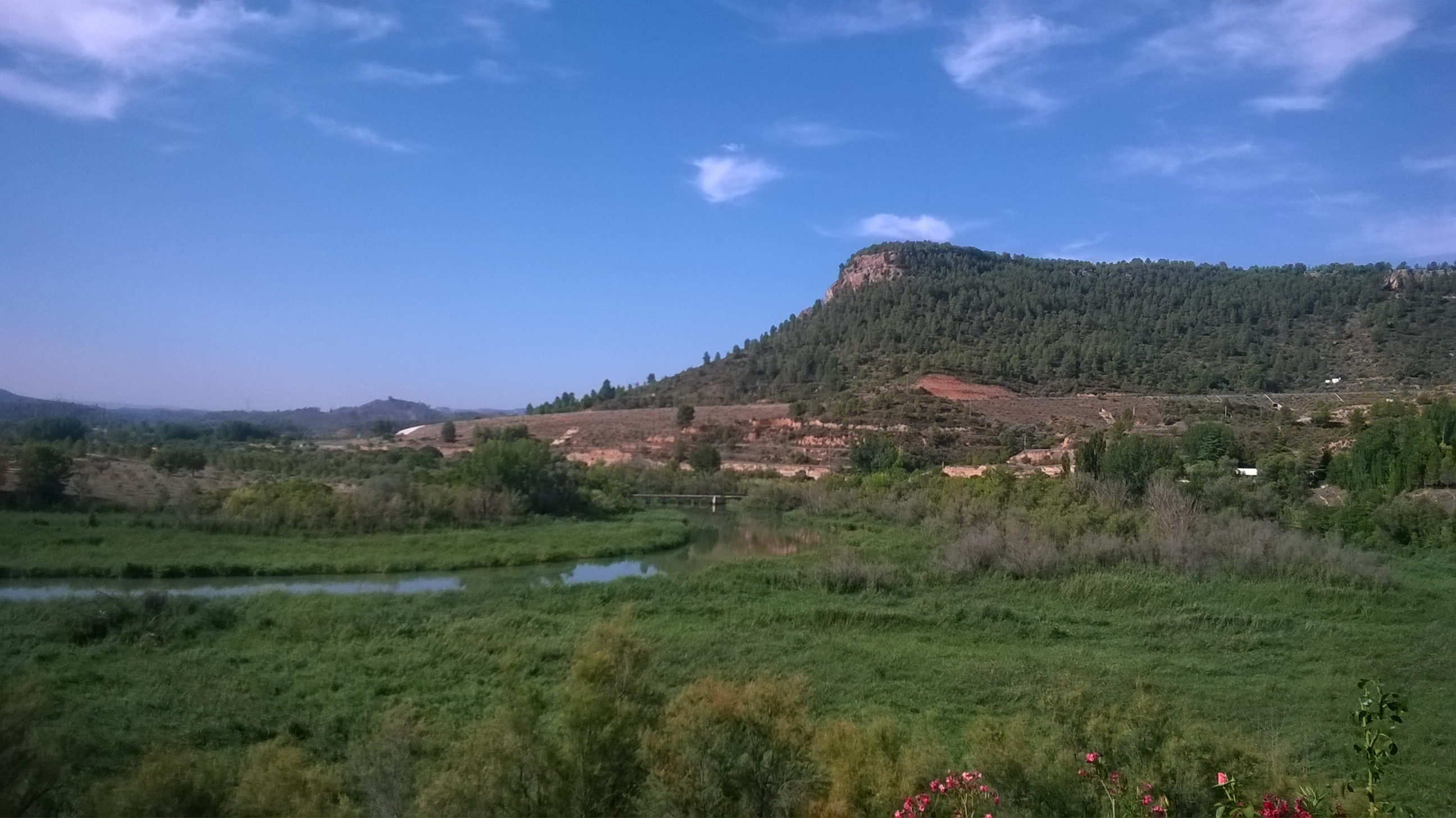 Vistas de Cofrentes tomadas durante el verano de 2014 por Isabel Valiente de la Granja.